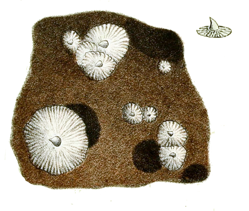 Echinorhinus brucus